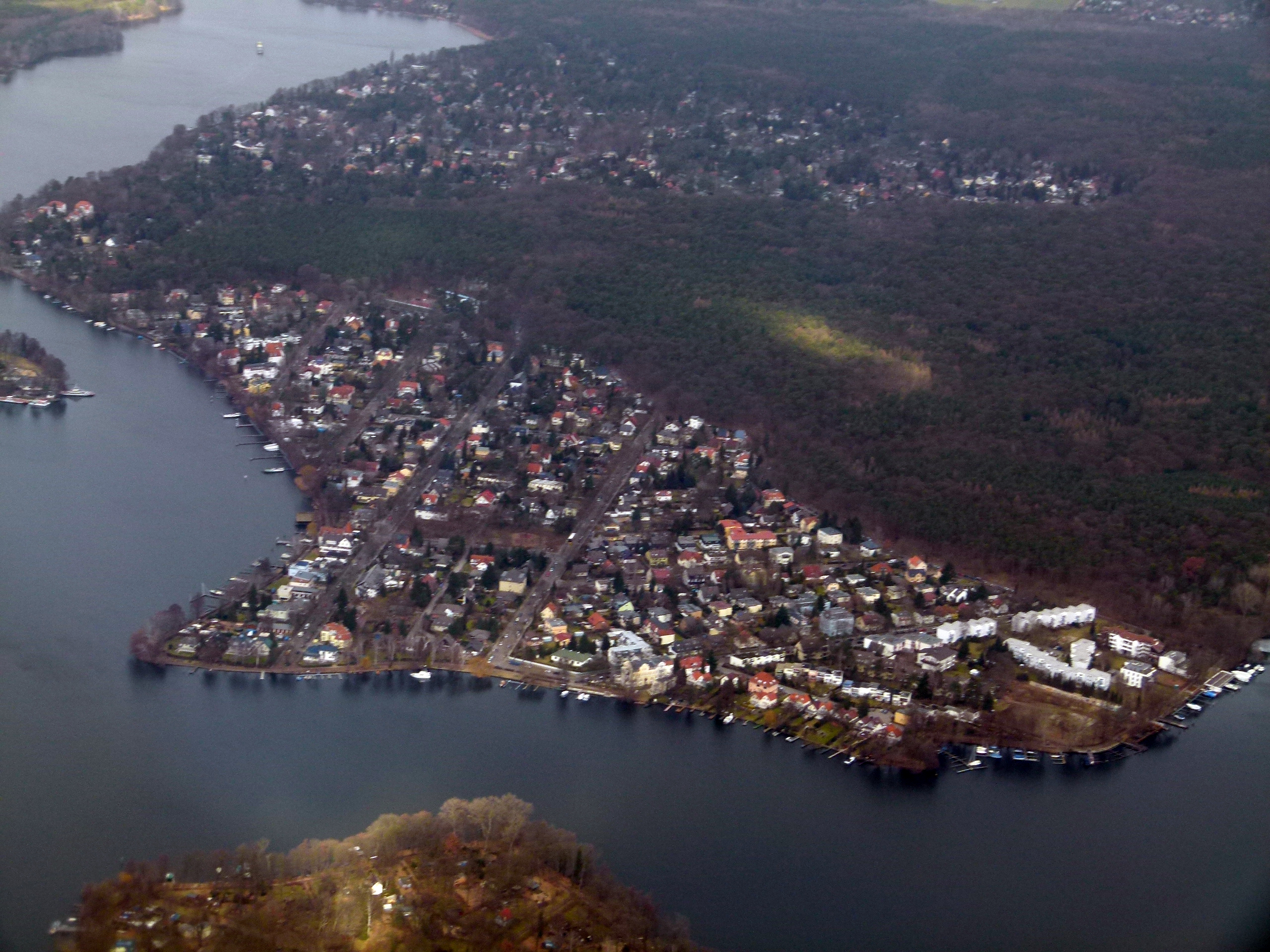 Blick auf Tegelort vom Flugzeug, Berlin-Reinickendorf